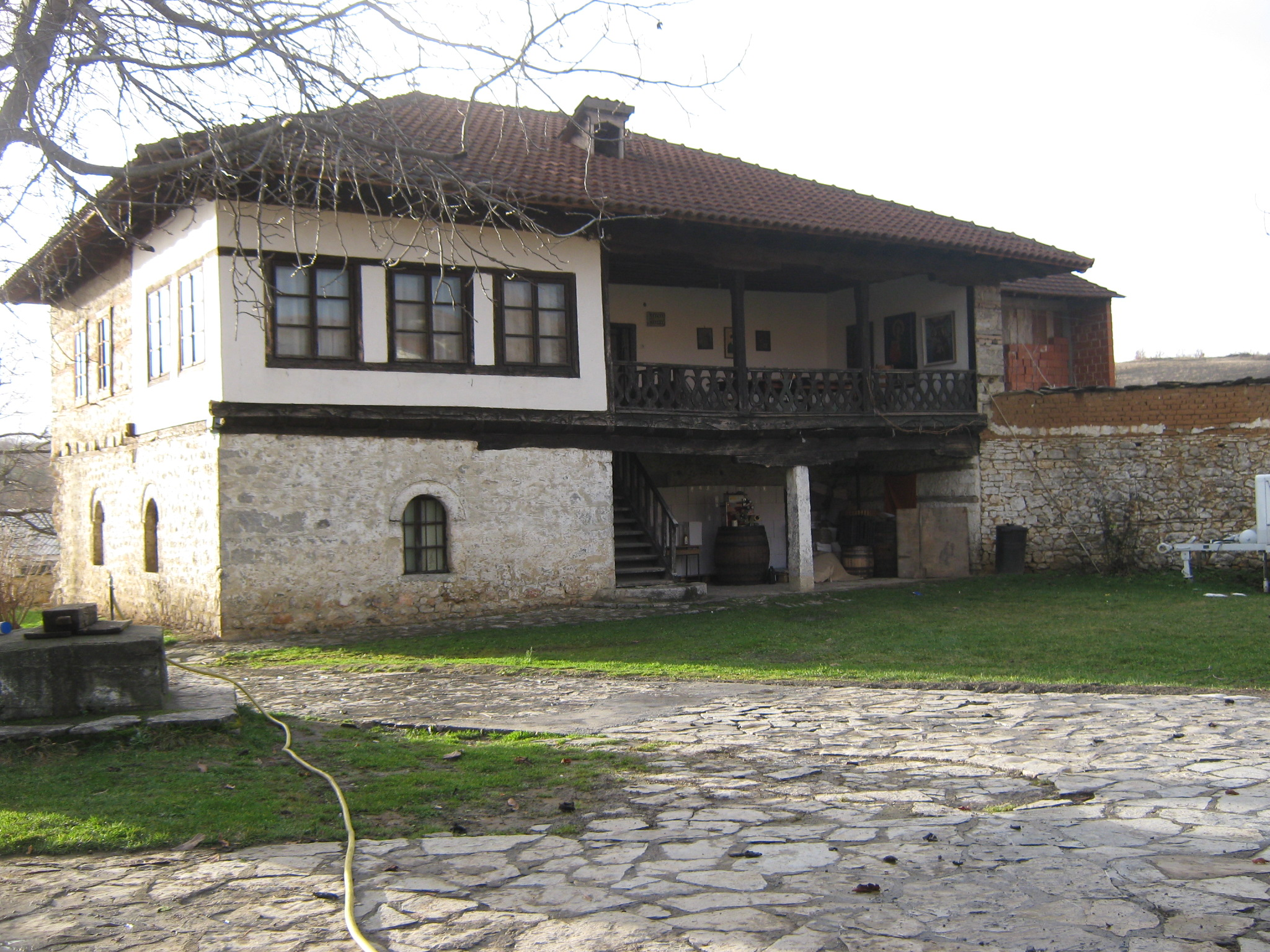 Srpskohrvatski / српскохрватски: Косово и Метохија